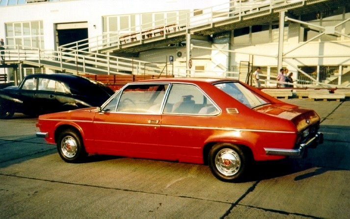 Tatra 613 coupe - prototype Vignale (1969) Photo: Ondrej Ertl (1997, Zlín)